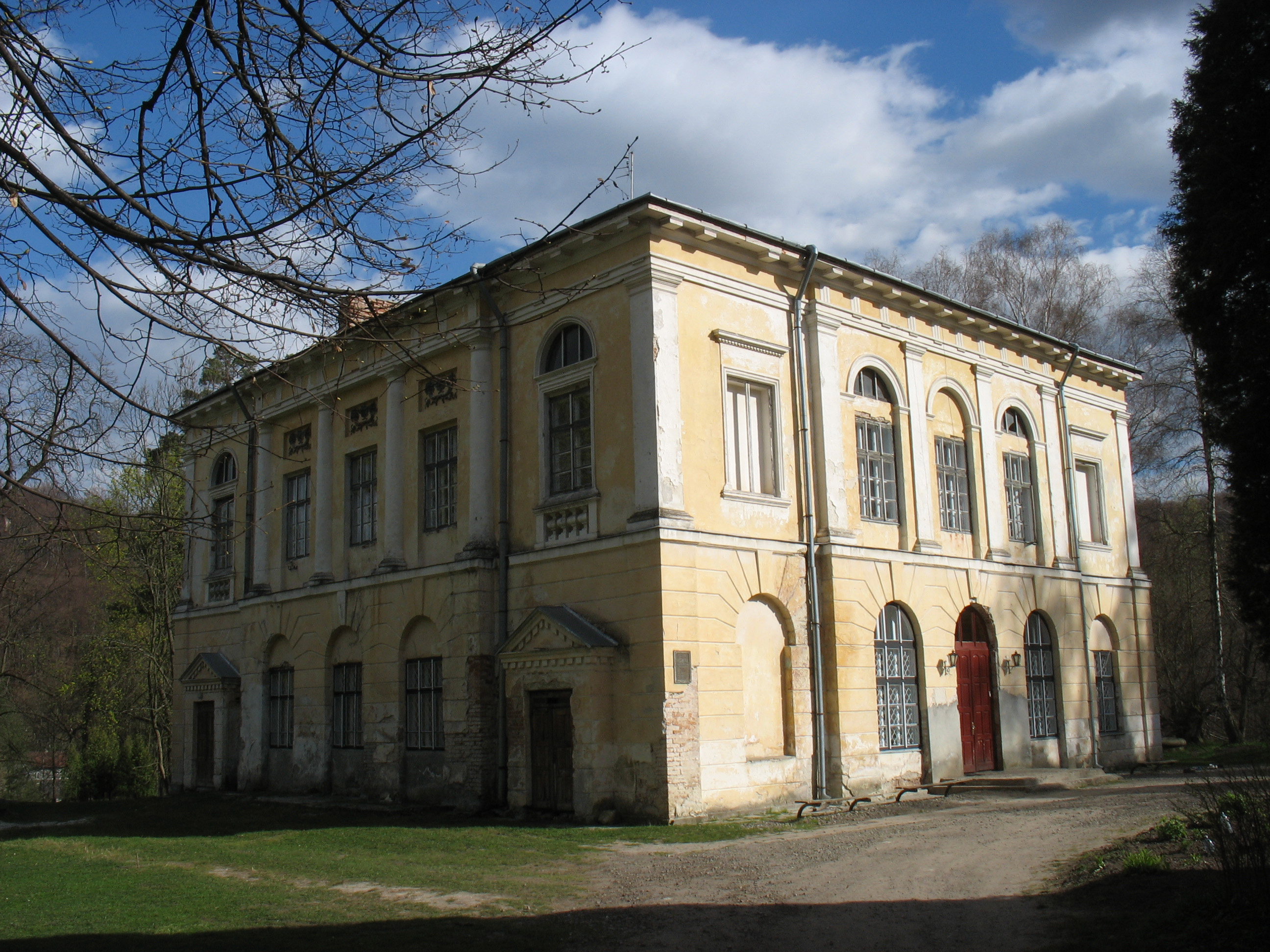 Рай, палац